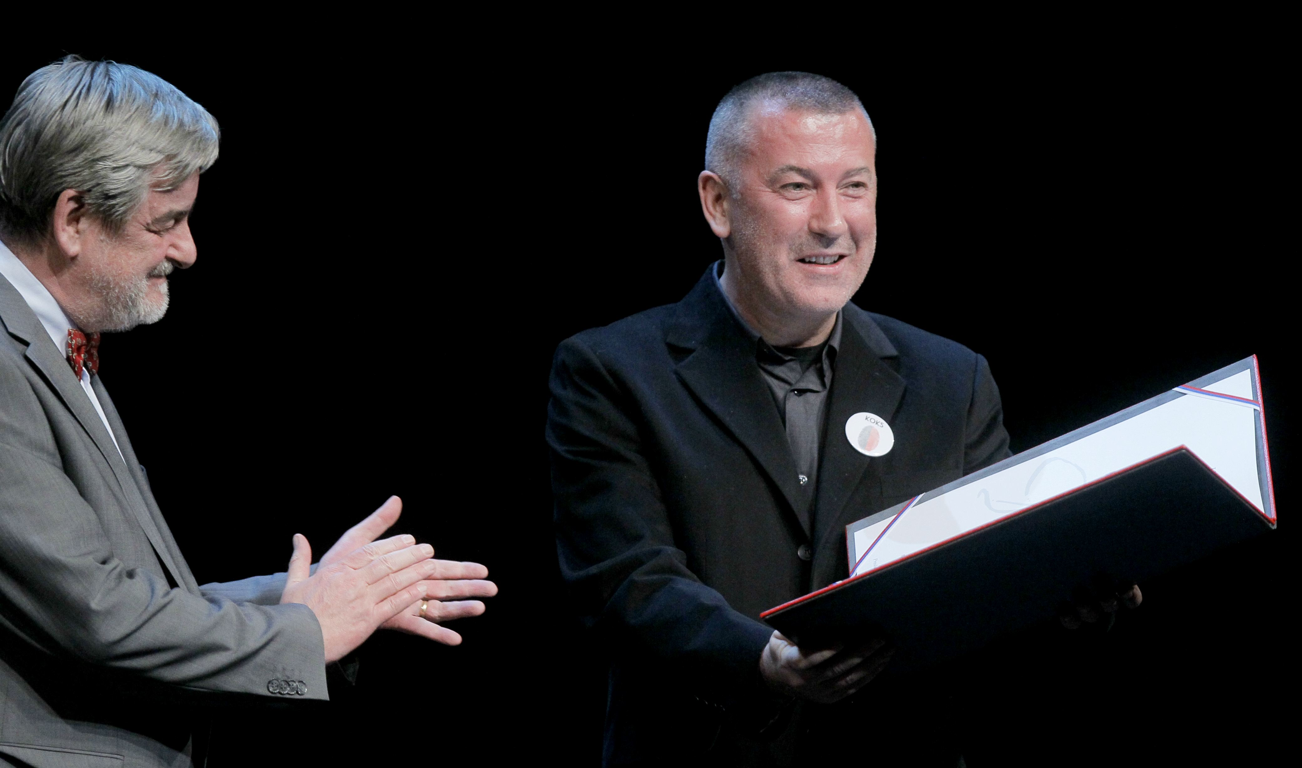 Državna proslava ob Prešernovem dnevu